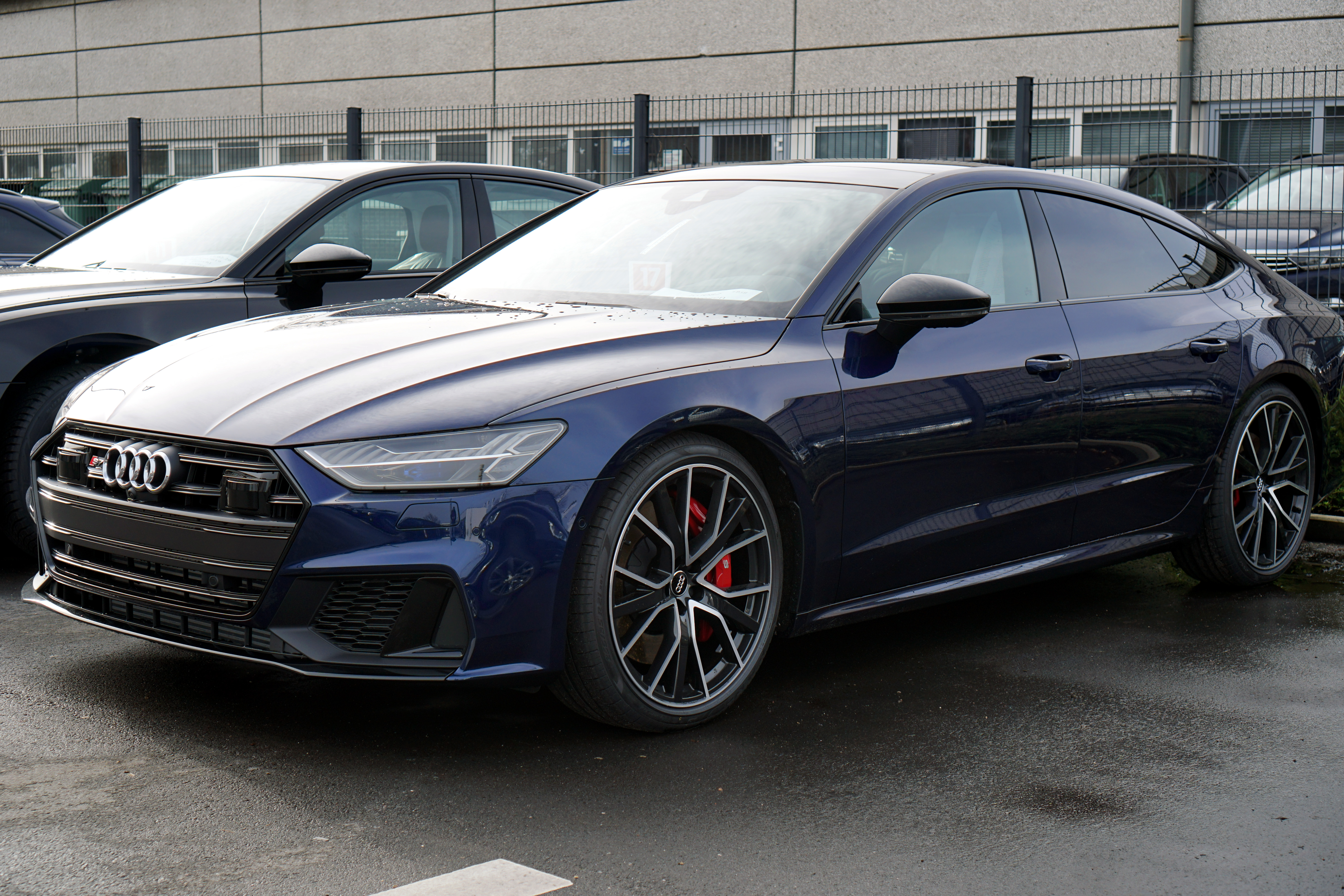 Audi S7 Modelljahr 2020 mit Felgen 5-V-Speichen-Stern-Design Audi Sport